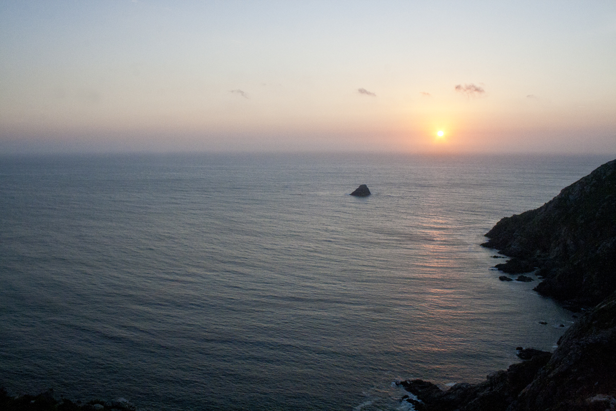 Donde se terminaba la tierra